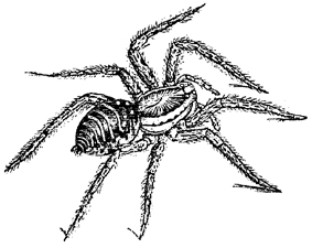 Sujet : Tarentule Source : La Magasin pittoresque de 1837 Graveur : Inconnu Licence : Licence GFDL. Auteur : Utilisateur:Valérie75